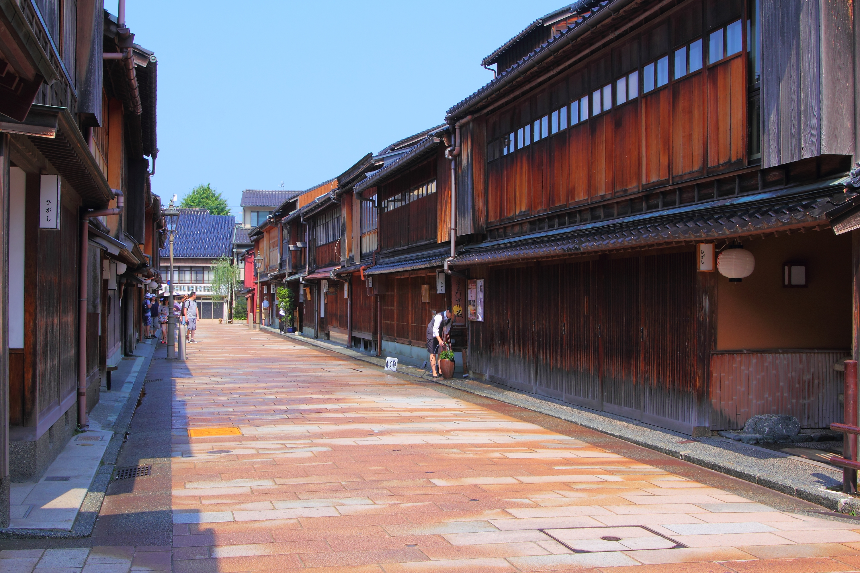 東山ひがし(石川県金沢市)